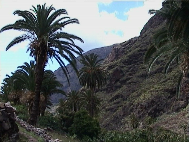 zelf gemaakt La Gomera